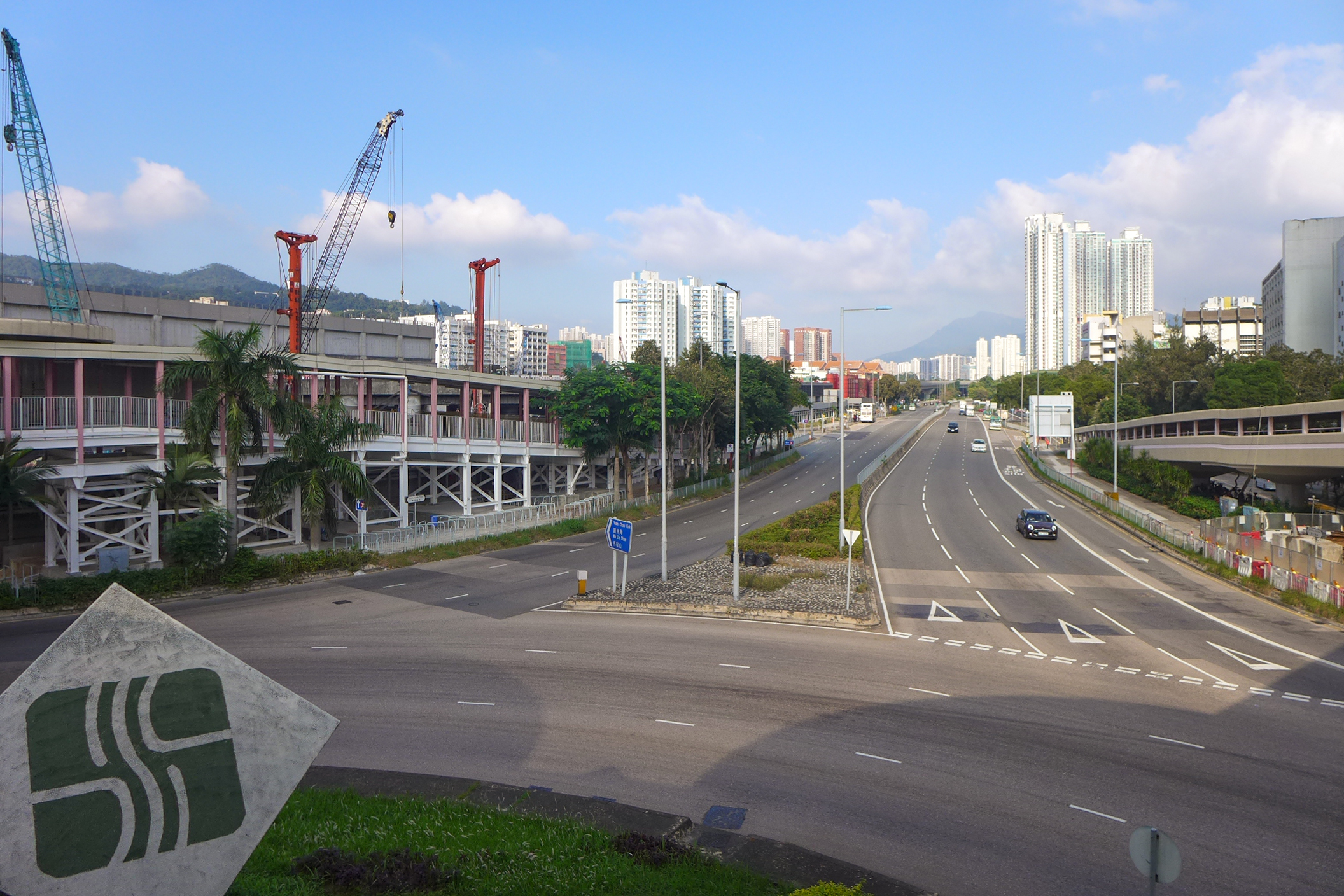 Che Kung Miu Road